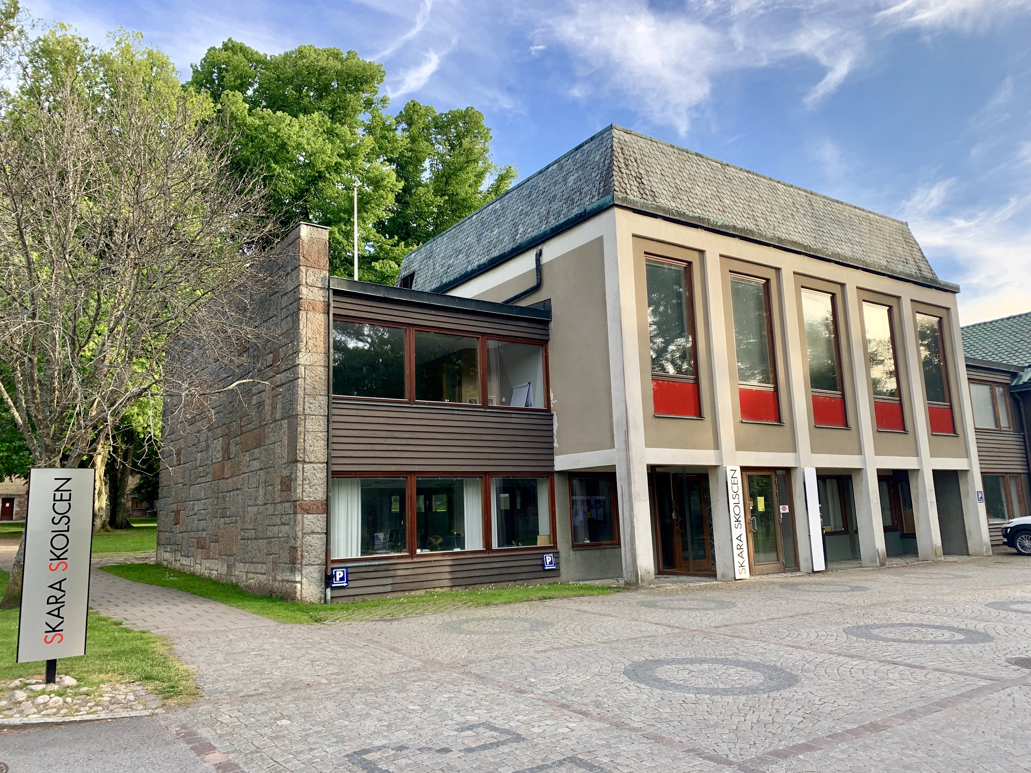 Nya lokalen för Skolscenen